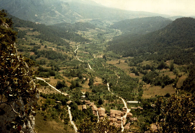 Panorámica Hozabejas